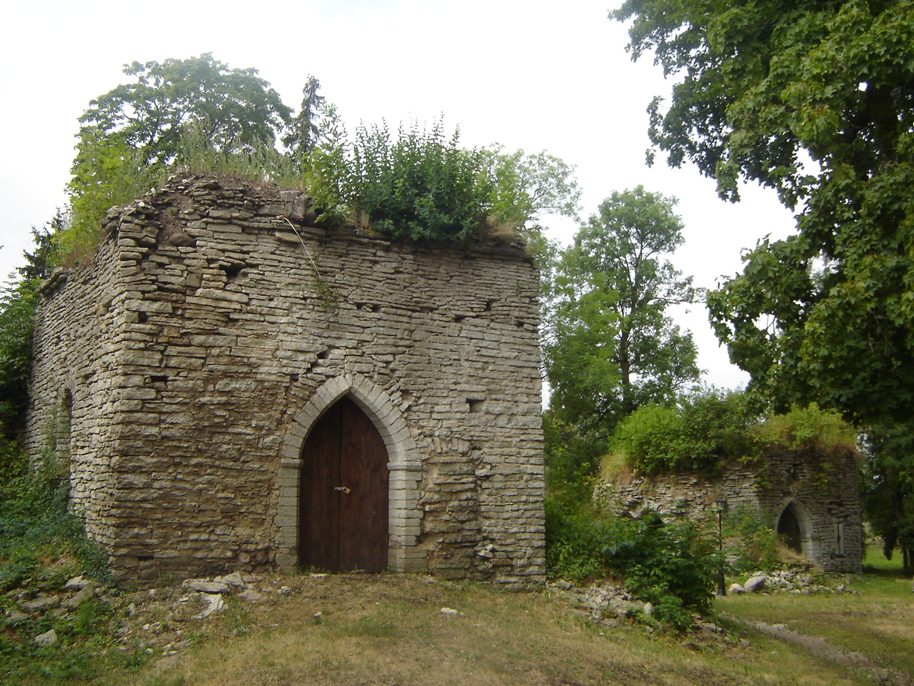 Vääna linnuse kaks linnuse torni